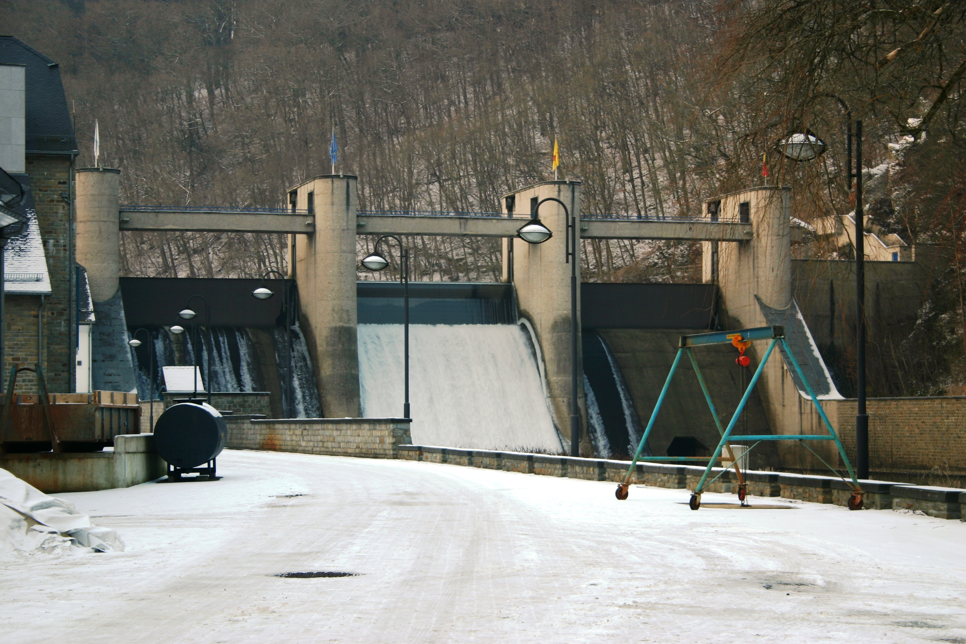 Talspär Nisramont